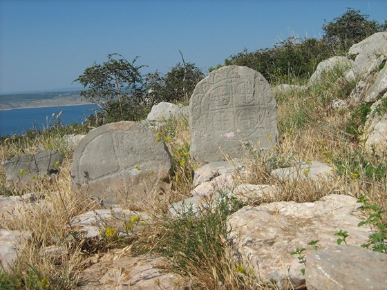 Mirila stone cemeteries in Dalmatia (Croatia), 17th to 20th century.